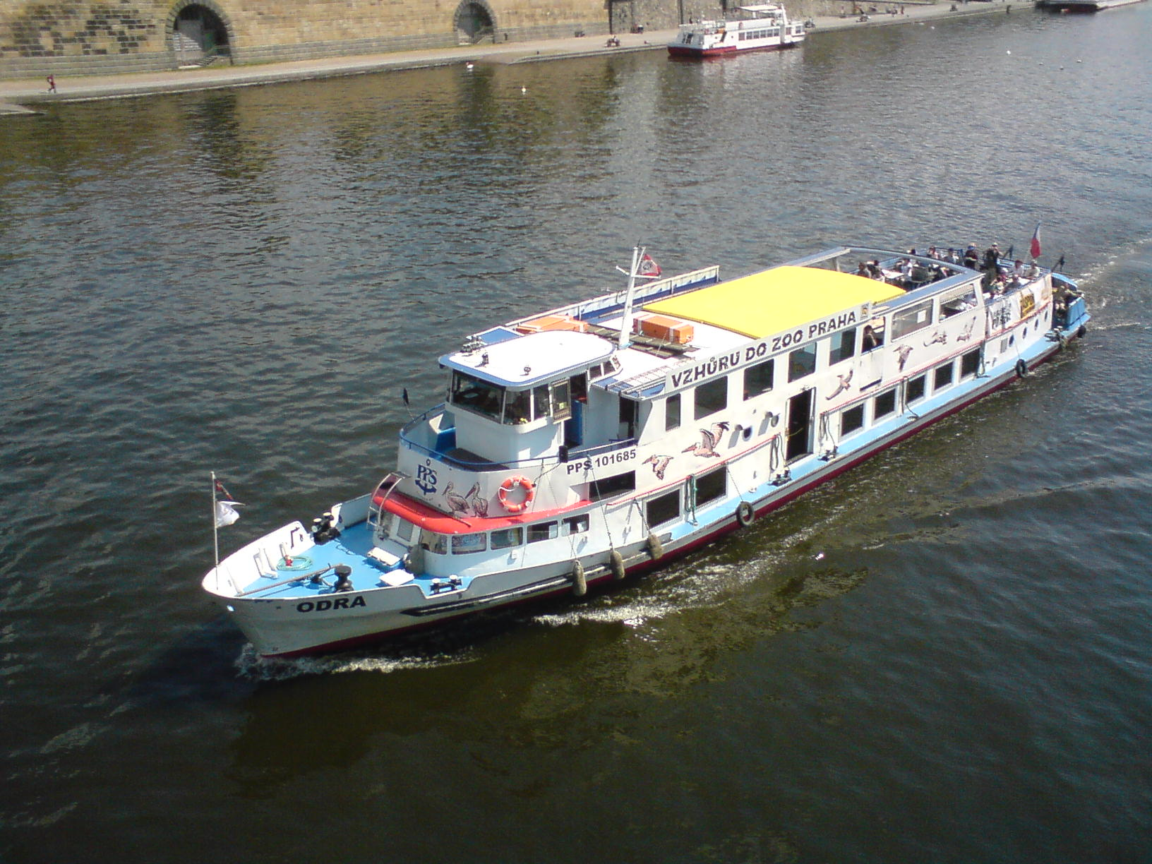 motorová osobní loď Odra projíždí Palackého mostem v Praze při hodinové vyjížďce k Národnímu divadlu a pod Vyšehrad